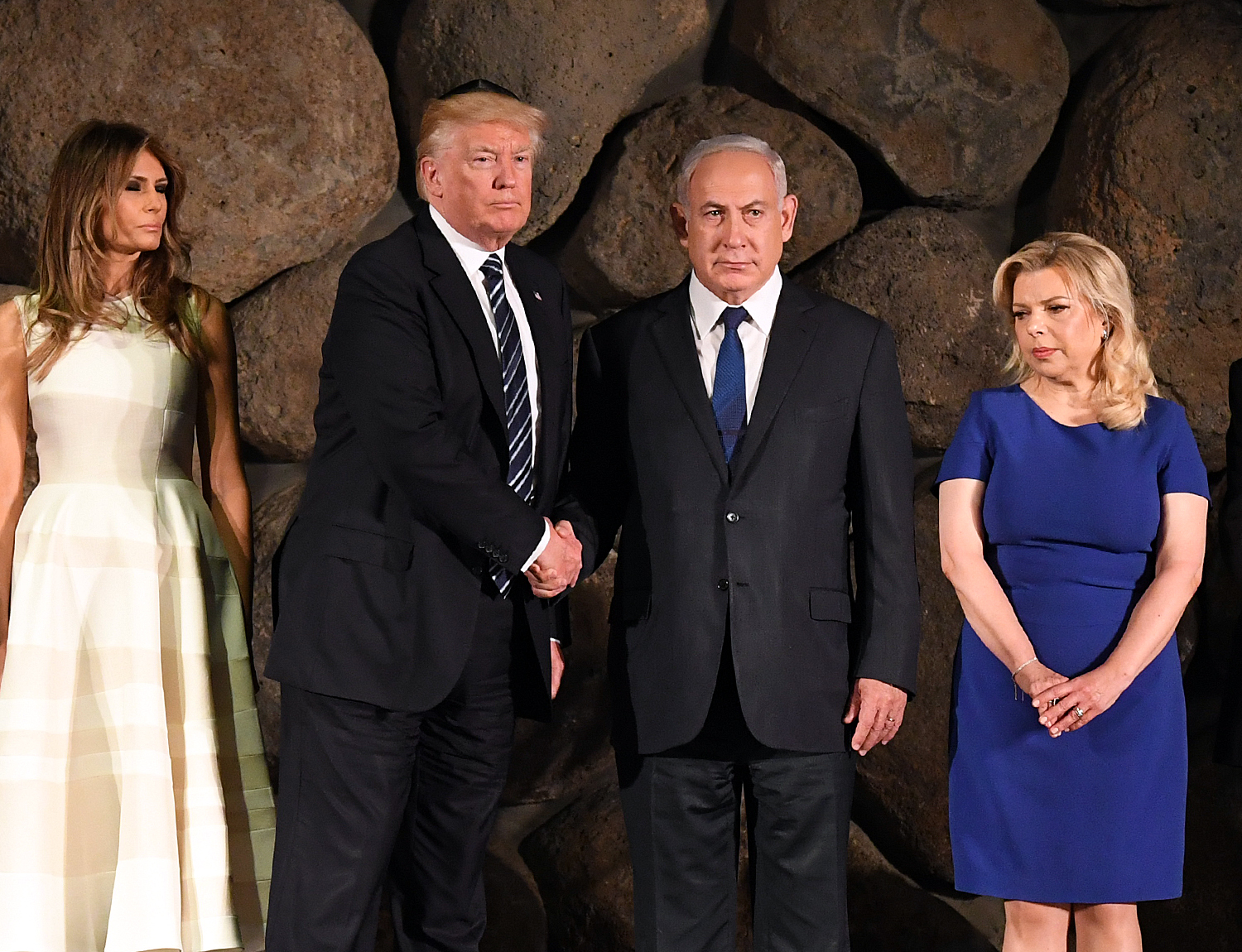 DSC_3861F